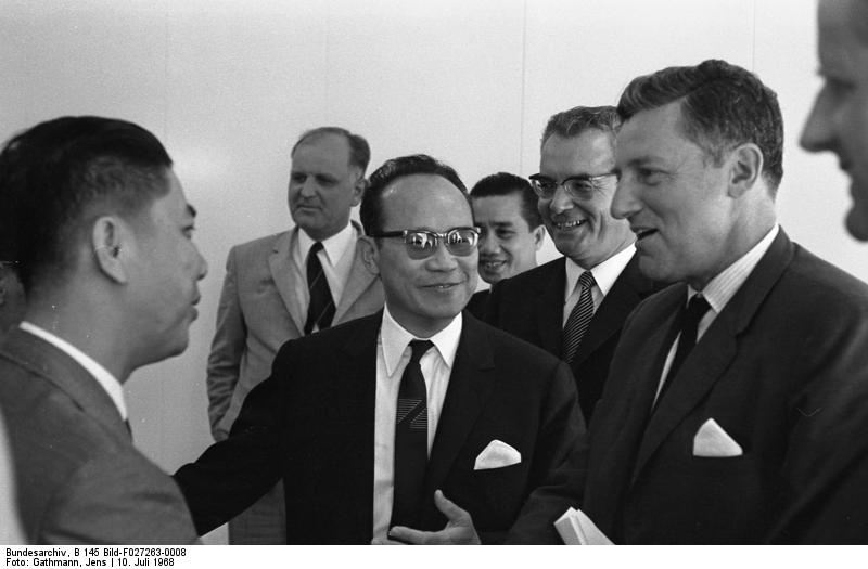 MdB Blumenfeld gibt Empfang für Parlamentarier aus Vietnam. Vizepräsident des Parlaments Nguyen Ba Can im Restaurant "Am Tulpenfeld"